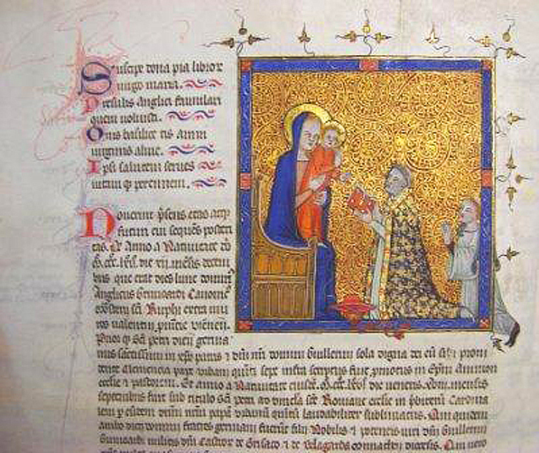 Page du Terrier d'Anglic de Grimoard XIVe siècle